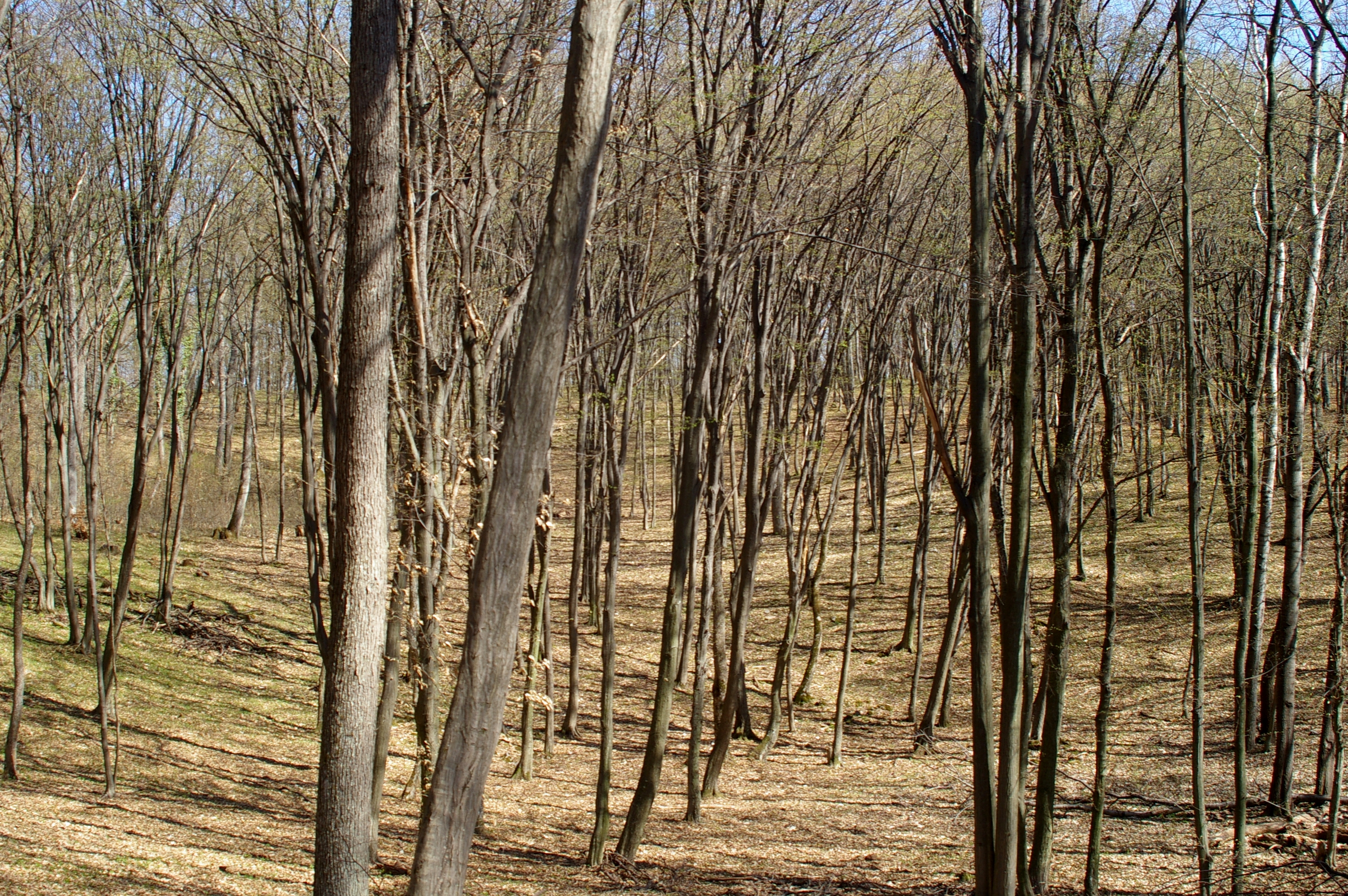 Koniarská planina - bukový les v závrtu